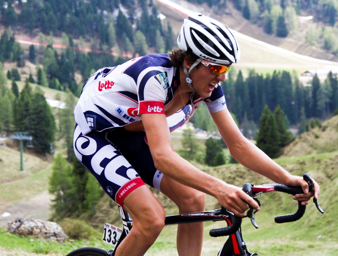 085 pampeago de greef